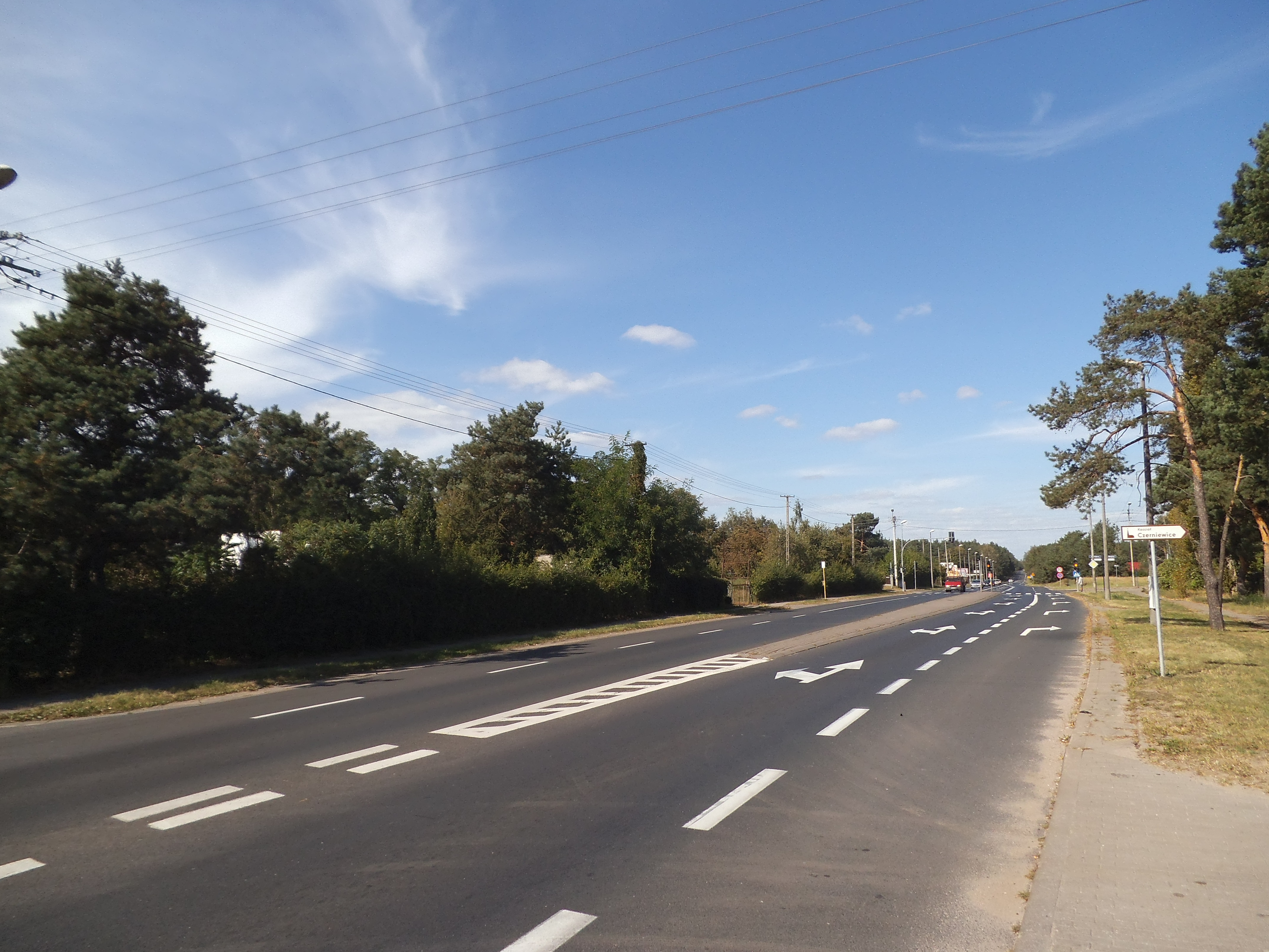 Fragment ul. Łódzkiej na terenie Czerniewic